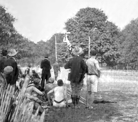 Charles Dvorak, Paris 1900